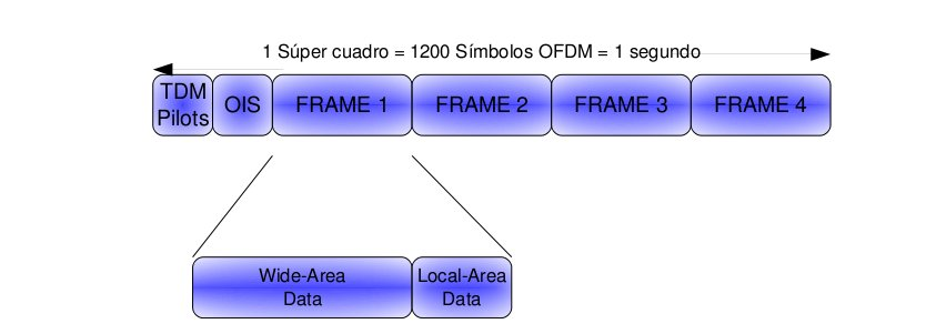 Supercuadro FLO